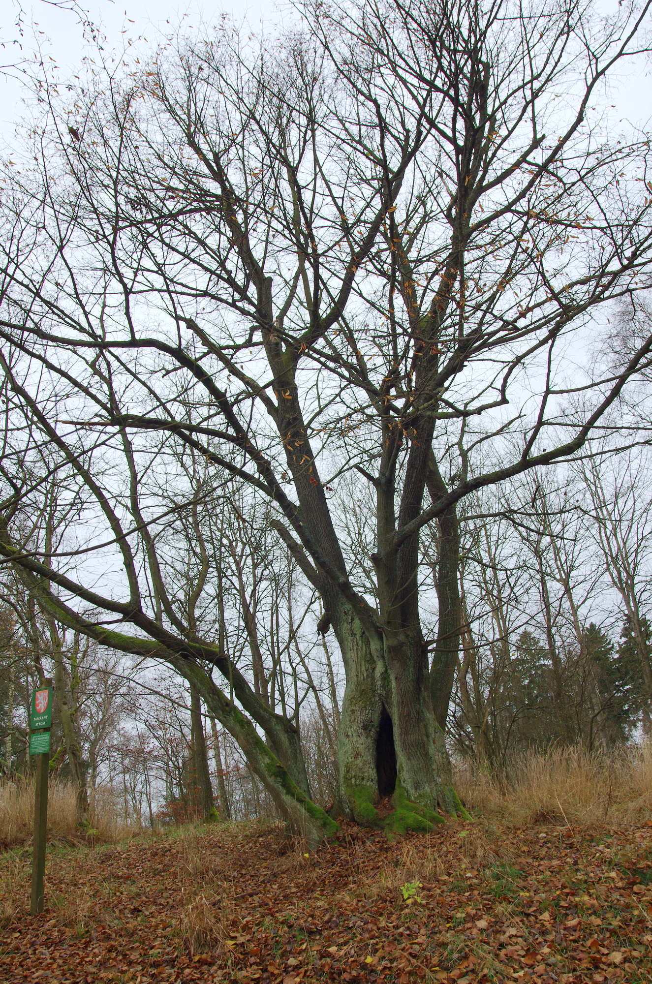 památný strom - Lípa u památníku - Krásná Lípa, okres Sokolov